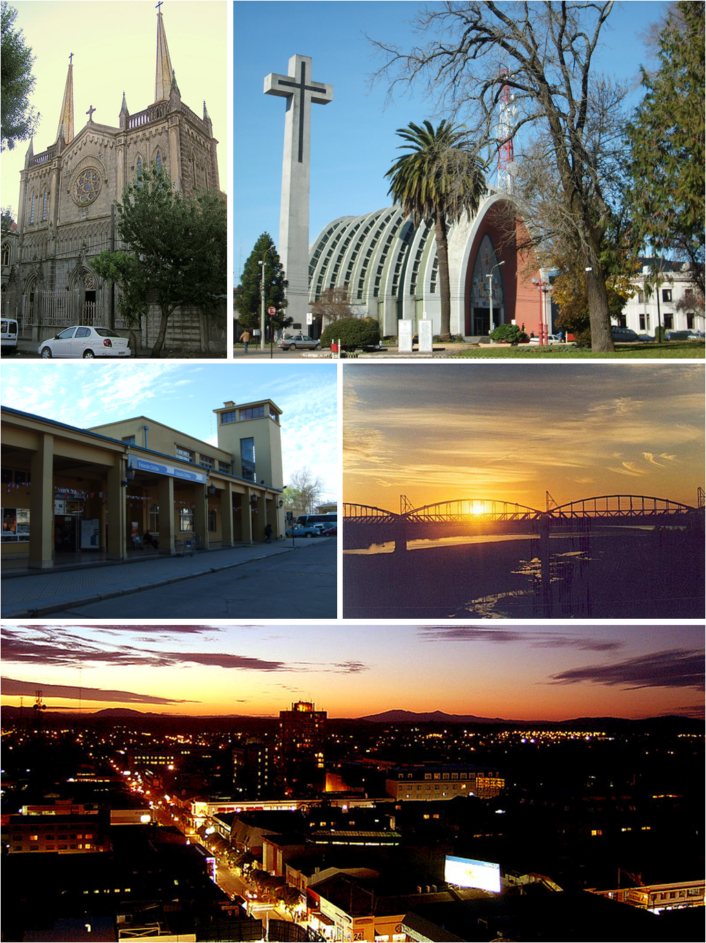 variadas imágenes de la ciudad de Chillán trabajo derivado de: Iglesia de la Virgen del Carmen de Chillán. Catedral de Chillán. Estación Chillán. Puente Ñuble. Panorámica de Chillán.